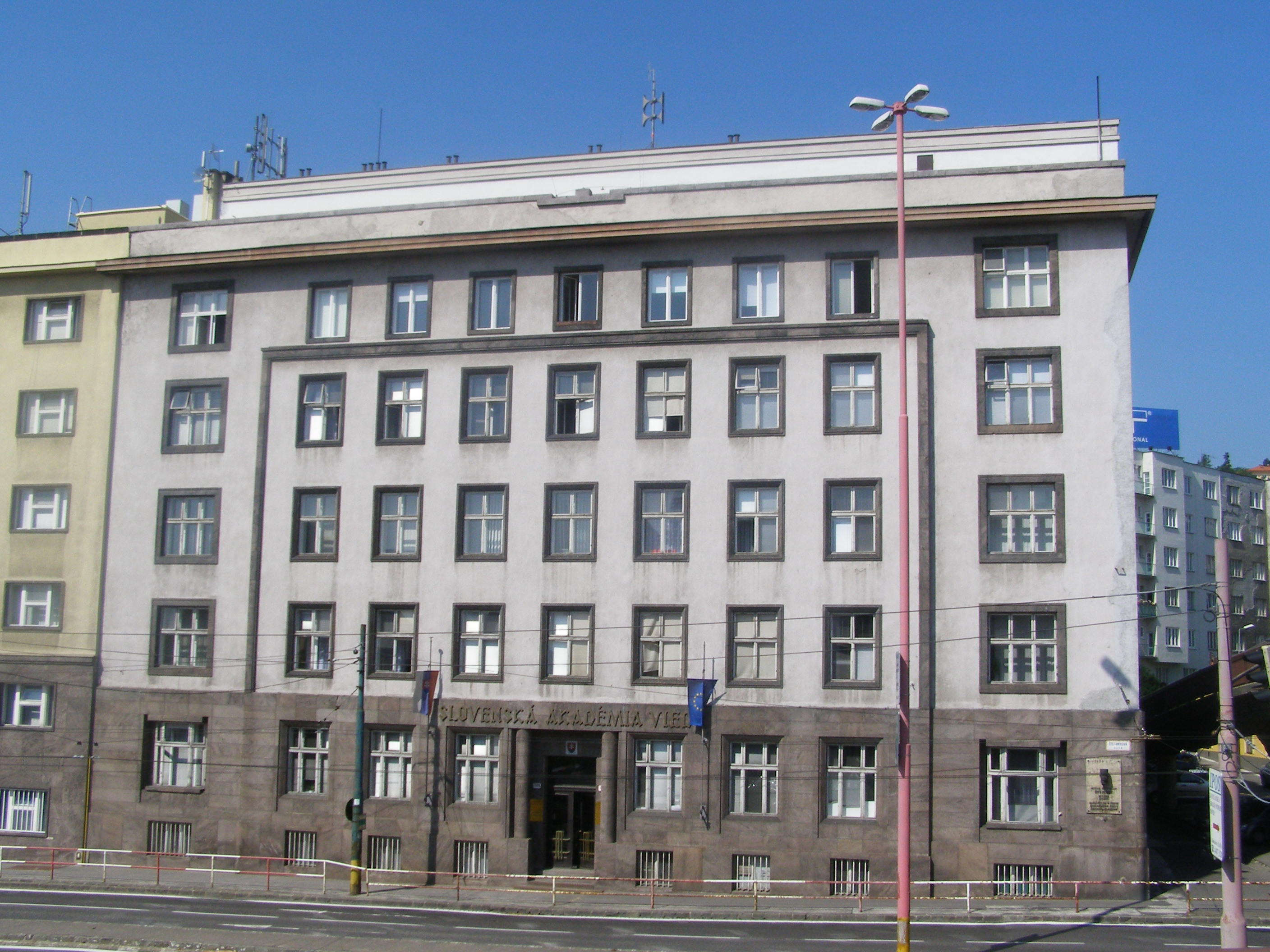 Budova Slovenskej akadémie vied (pôvodne Zemská úradovňa všeobecného penzijného ústavu) na Štefánikovej ul. č. 49 v Bratislave vznikla v rokoch 1925 - 1927 podľa projektu Jindřicha Merganca